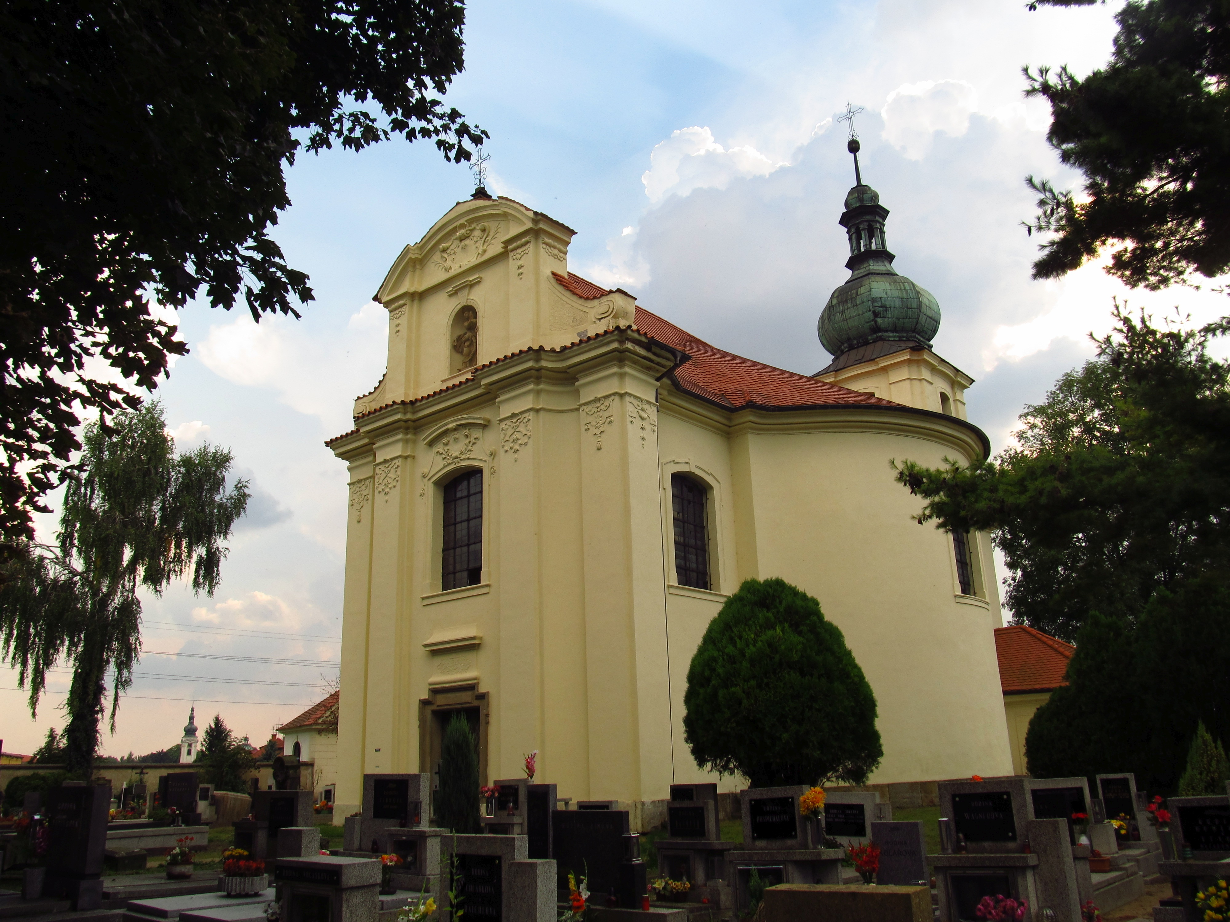 Kostel svatých Petra a Pavla, Doksany.